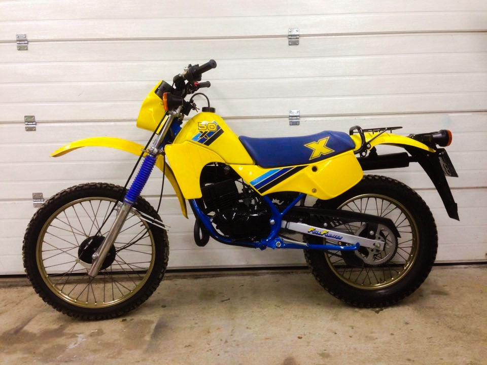 Suzuki Ts50X